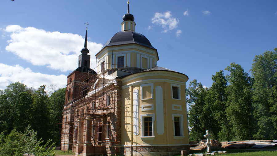 Вид на церковь святителя Николая в селе Подъячево(с востока), май 2011